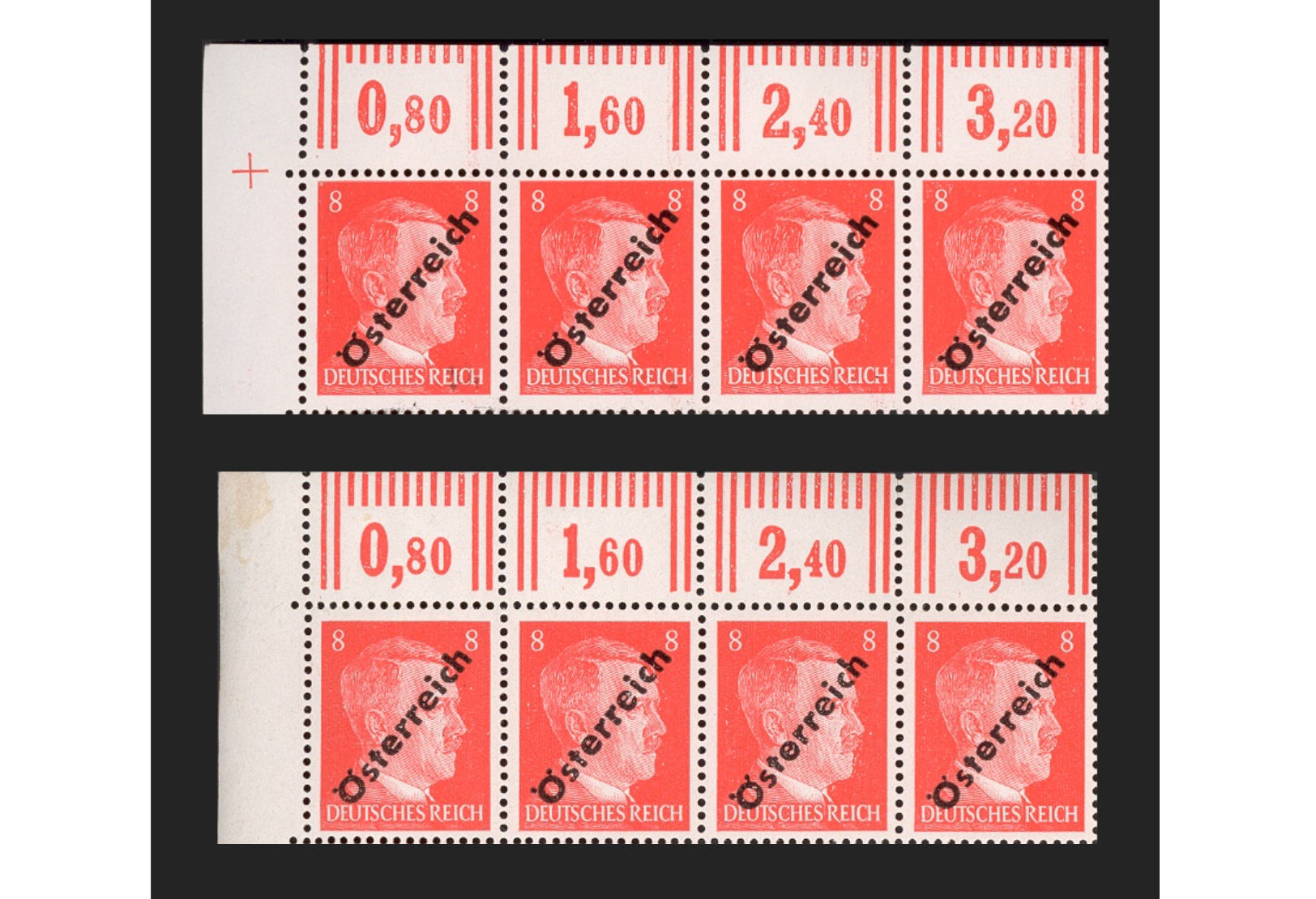 Retusche 1945 - Noch nicht retuschierte Aufdrücke in der ersten Zeile (2. Marke: kurzes r, 3. Marke kurzes t) sowie retuschierte Aufdrücke in der zweiten Zeile (2. Marke retuschiert, 3. Marke bei der Retuschierung übersehen).